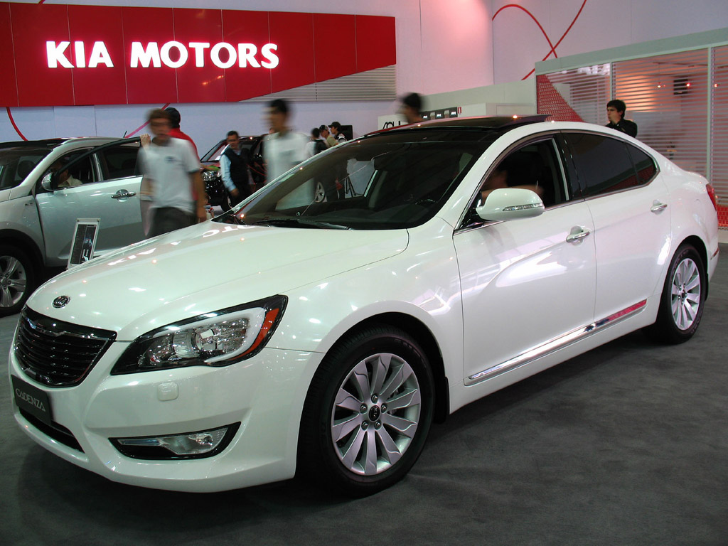 Kia Cadenza EX V6 2011